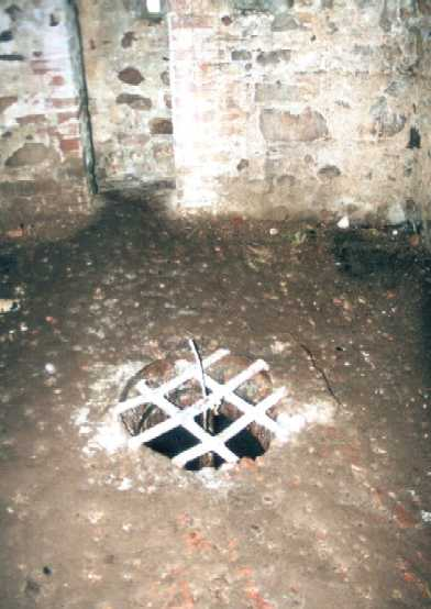 Angstloch in der Großen Kasematte der Festung Spantekow in Mecklenburg-Vorpommern